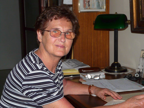 Bożena Fabiani przy biurku